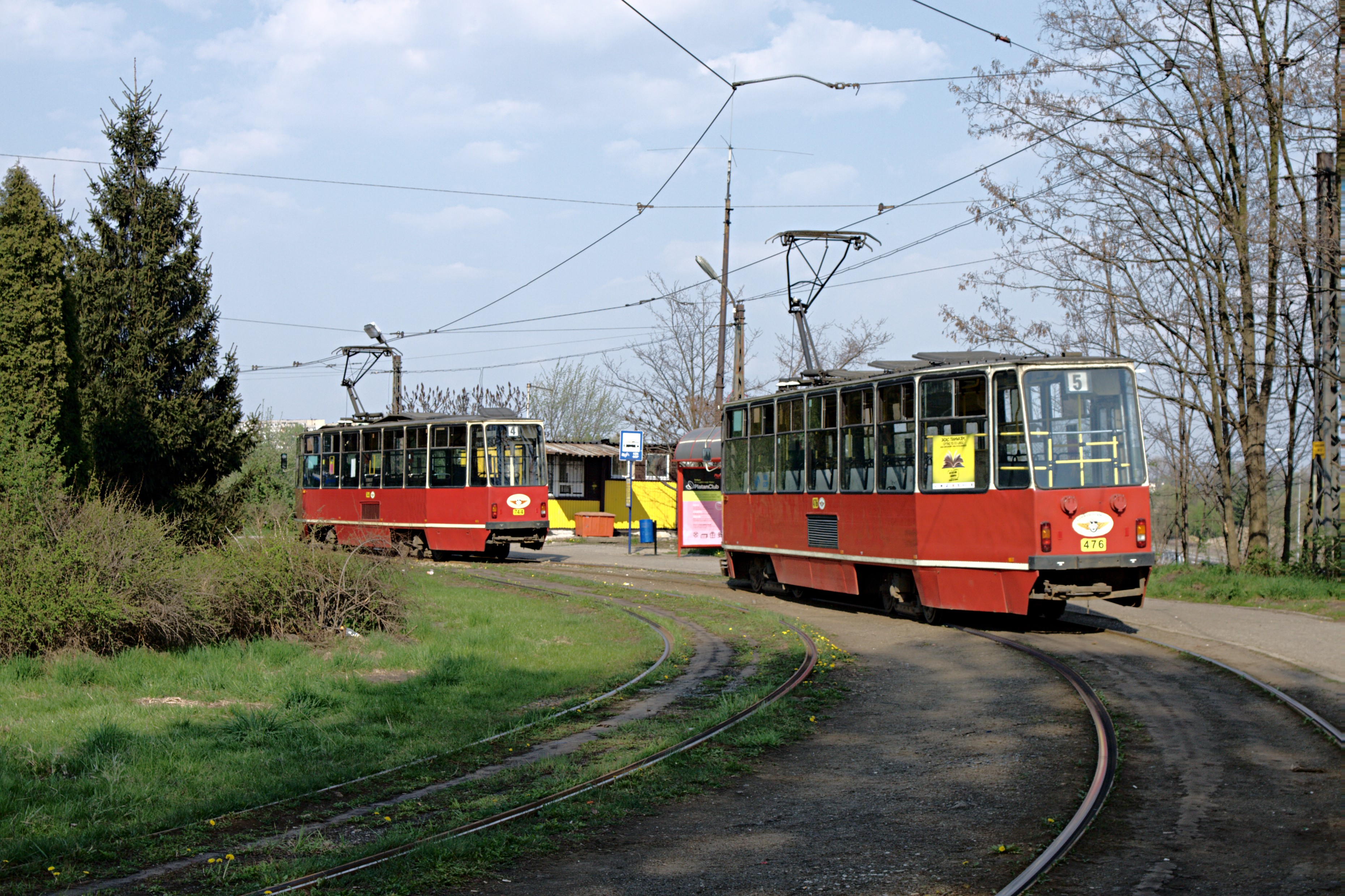 Pętla tramwajowa na Zabrzu-Zaborzu.